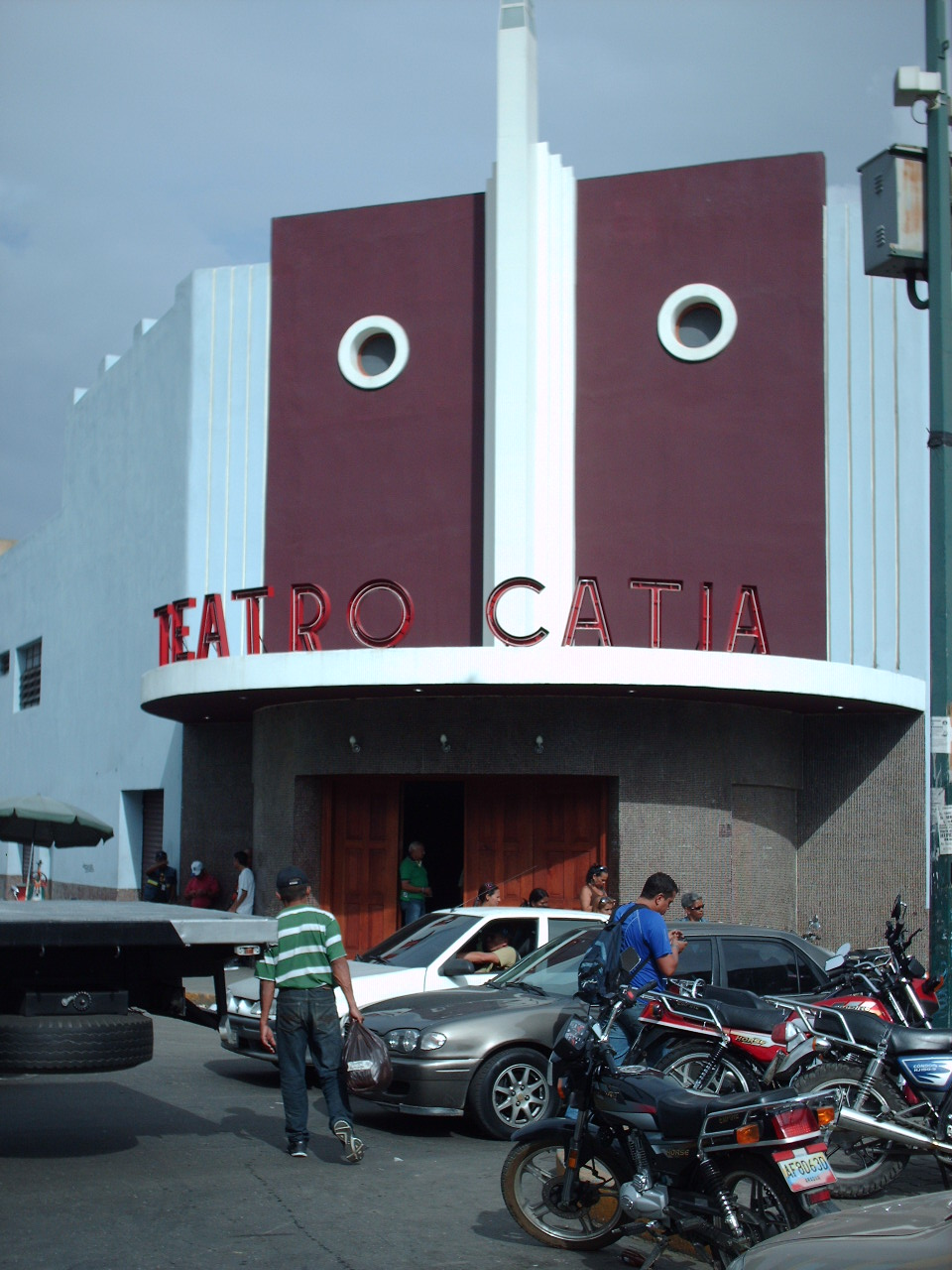 Fachada del Teatro Catia, en la Parroquia Sucre de Caracas, Venezuela